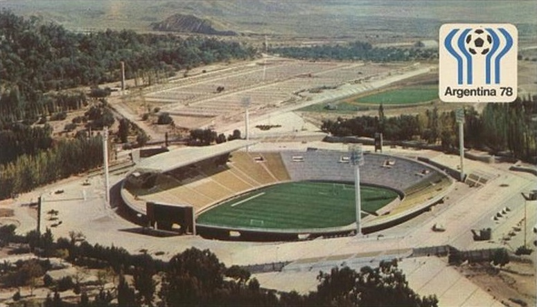 Postal del Estadio Malvinas Argentinas en 1978.